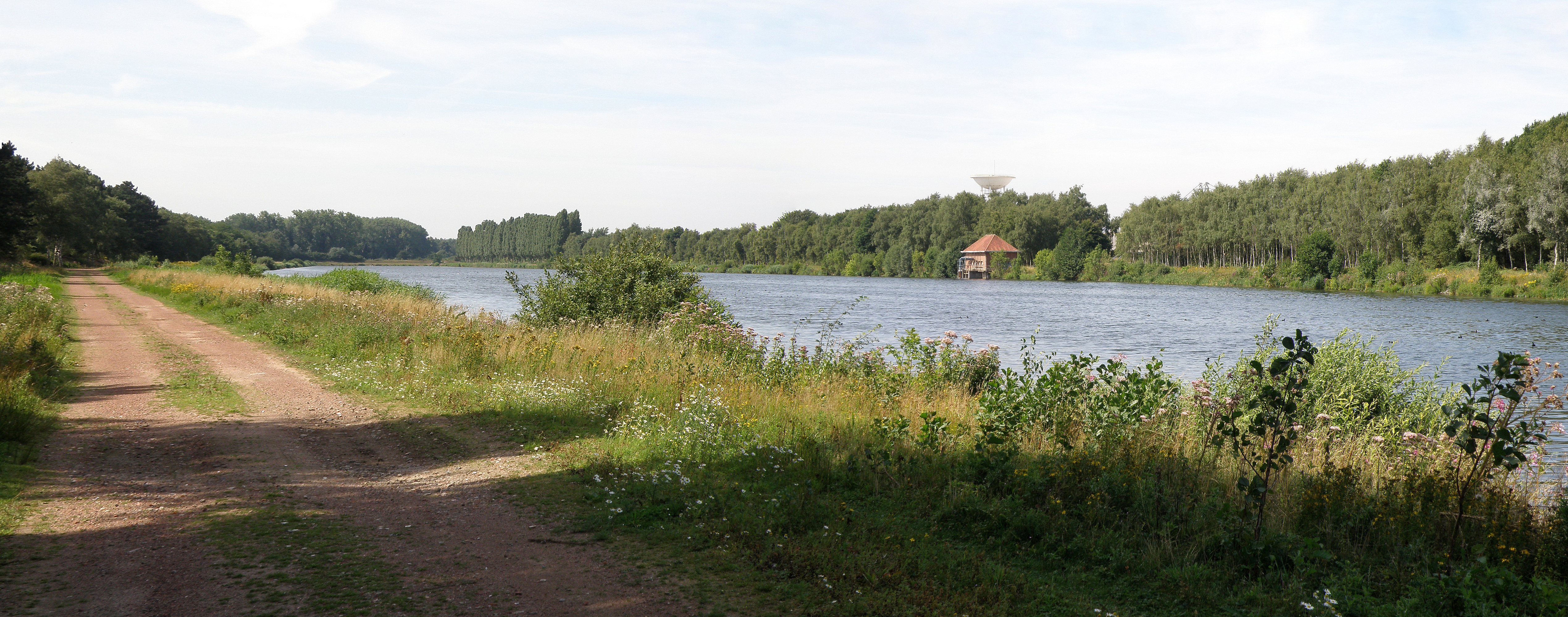 Duffel (prov. Antwerpen, België). Waterbekken aan de linkeroever van de Nete. De Nete loopt achter de bomen rechts, evenwijdig met het waterbekken. Blik richting westen.